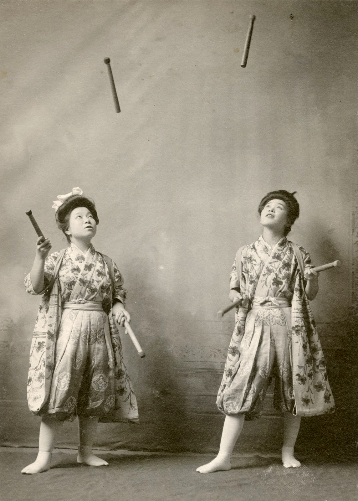 アメリカ巡業をしていた日本人ジャグラー。1908年。当時日本の軽業師の技術は海外で高い評価を受けていた。